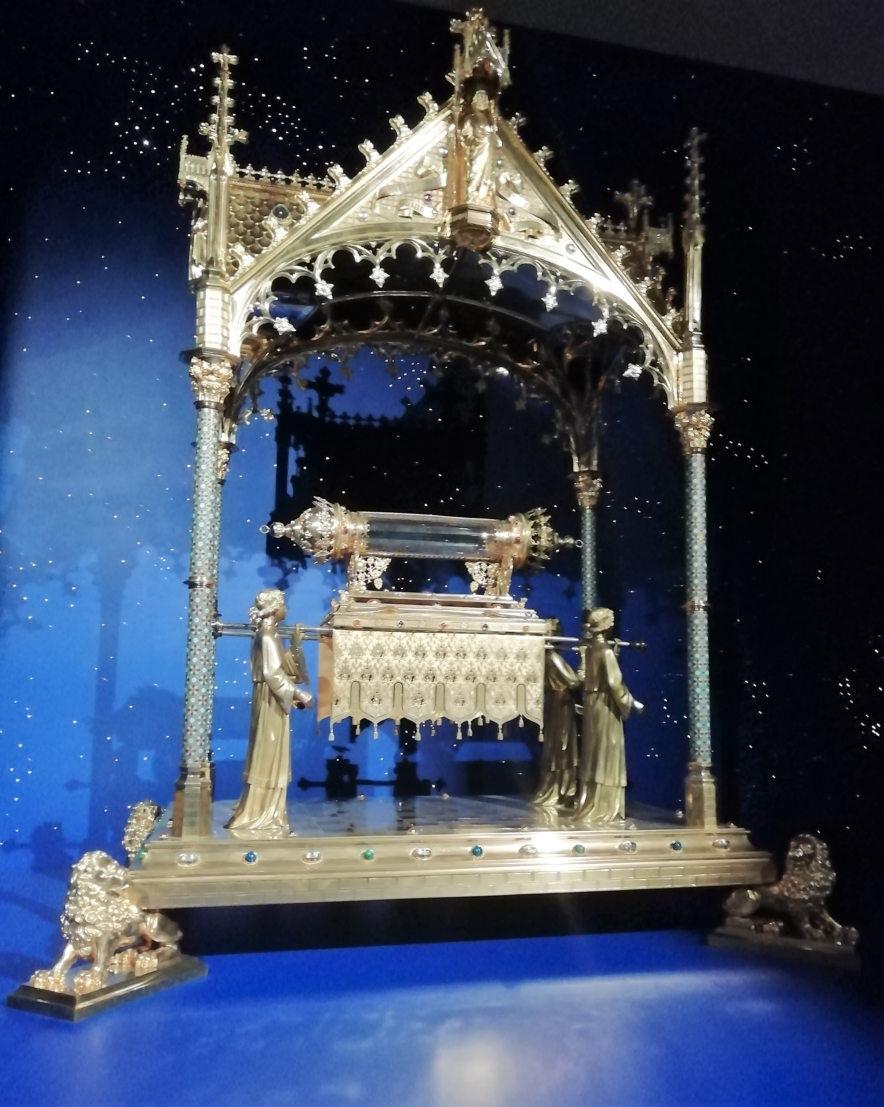 Le reliquaire-monstrance des Saints Jacques, exposé sans reliques, collection de l'église Saint-Jacques de Liège. Oeuvre des orfèvres Joseph Wilmotte (1834-1893) et Georges Wilmotte (1863-1895) et de l'architecte Jean-Baptiste Béthune (1821-1894) Il celèbre saint Jacques le Mineur et saint Jacques le Majeur. grand reliquaire de 1889 (exposition universelle) en laiton doré, pierres et émaux. traité en conservation preventive par Louis-Pierre Baert en 2019. Exposition temporaire "Chemins d'étoiles. Reliques et pélerinages au Moyen Âge" du 30 juin au 10 novembre 2019 au Musée de Saint-Antoine-l'Abbaye. Saint-Antoine-l'Abbaye, Isère, AuRA, France.